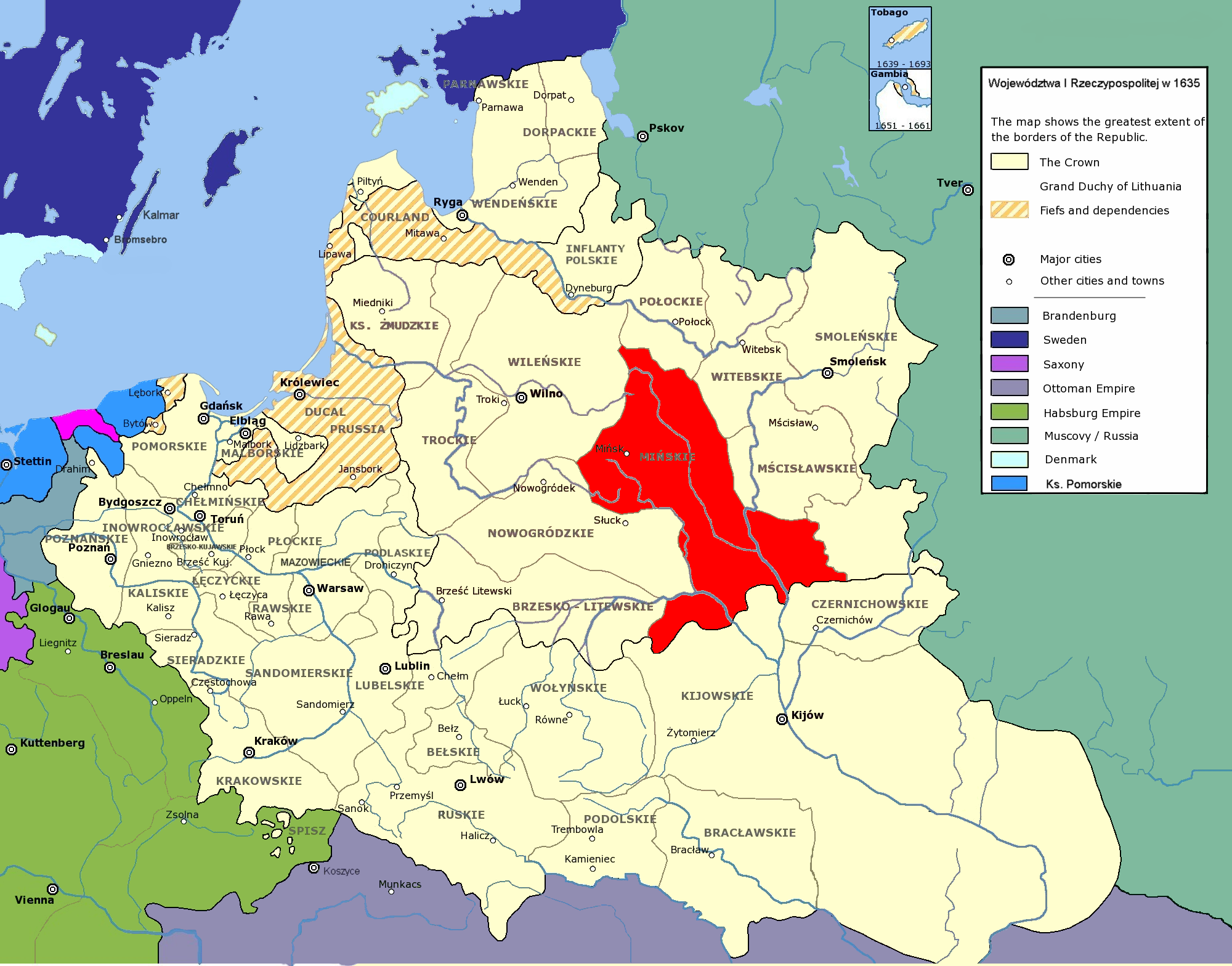 Minsk voievodship in 1635